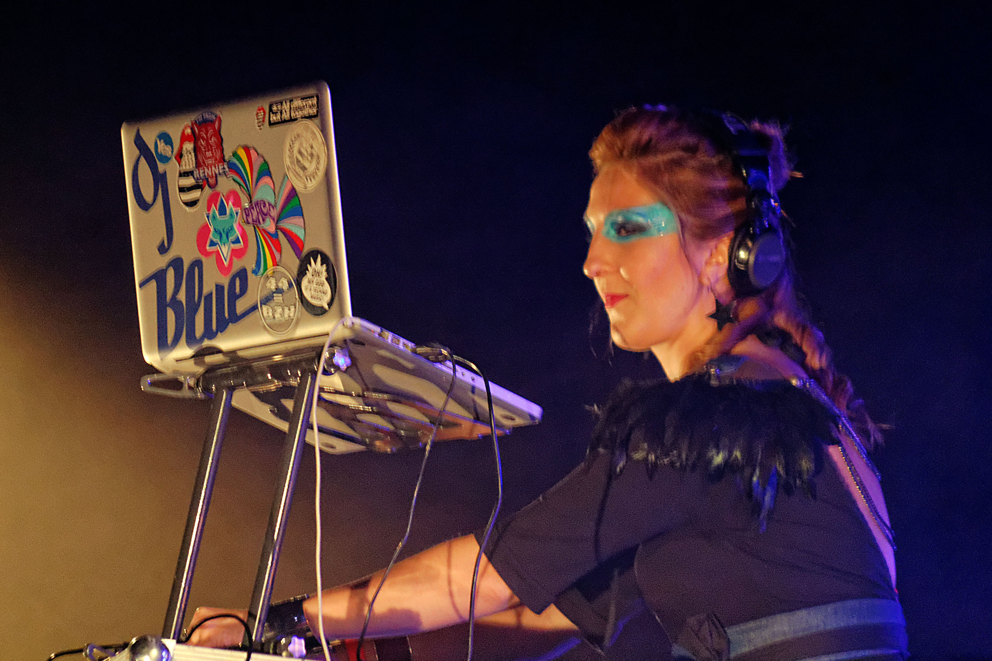 Set de la Dj Miss Blue en conclusion du Stered Festival le 13 Novembre 2015 au Parc des Expos de Langolvas à Morlaix (Finistère, Bretagne).